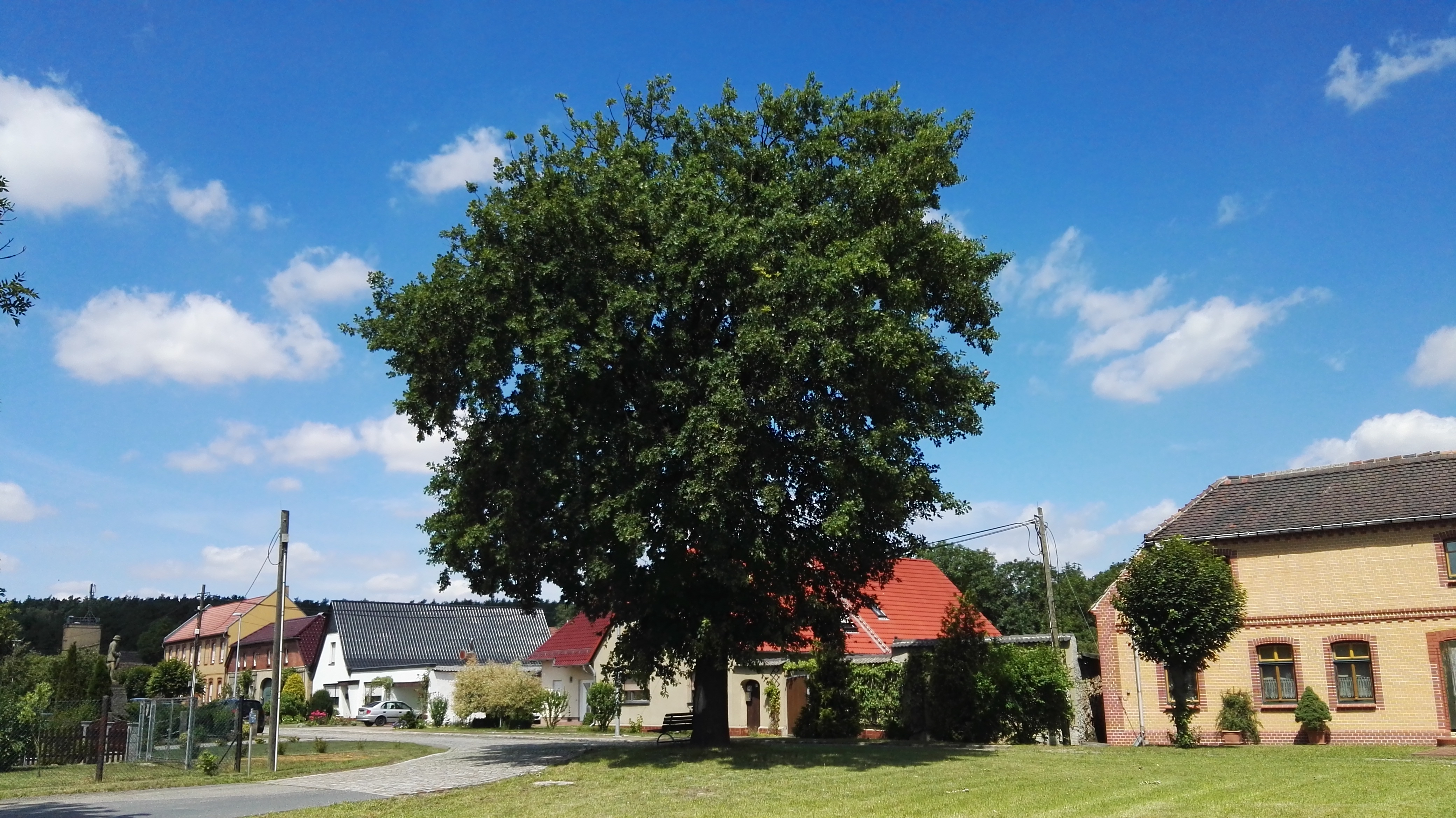 Naturdenkmal in Senftenberg 0102-1; Stieleiche (Quercus robur) in Brieske-Dorf auf Straßengabelung vor Grundstück Nr. 12 und 13